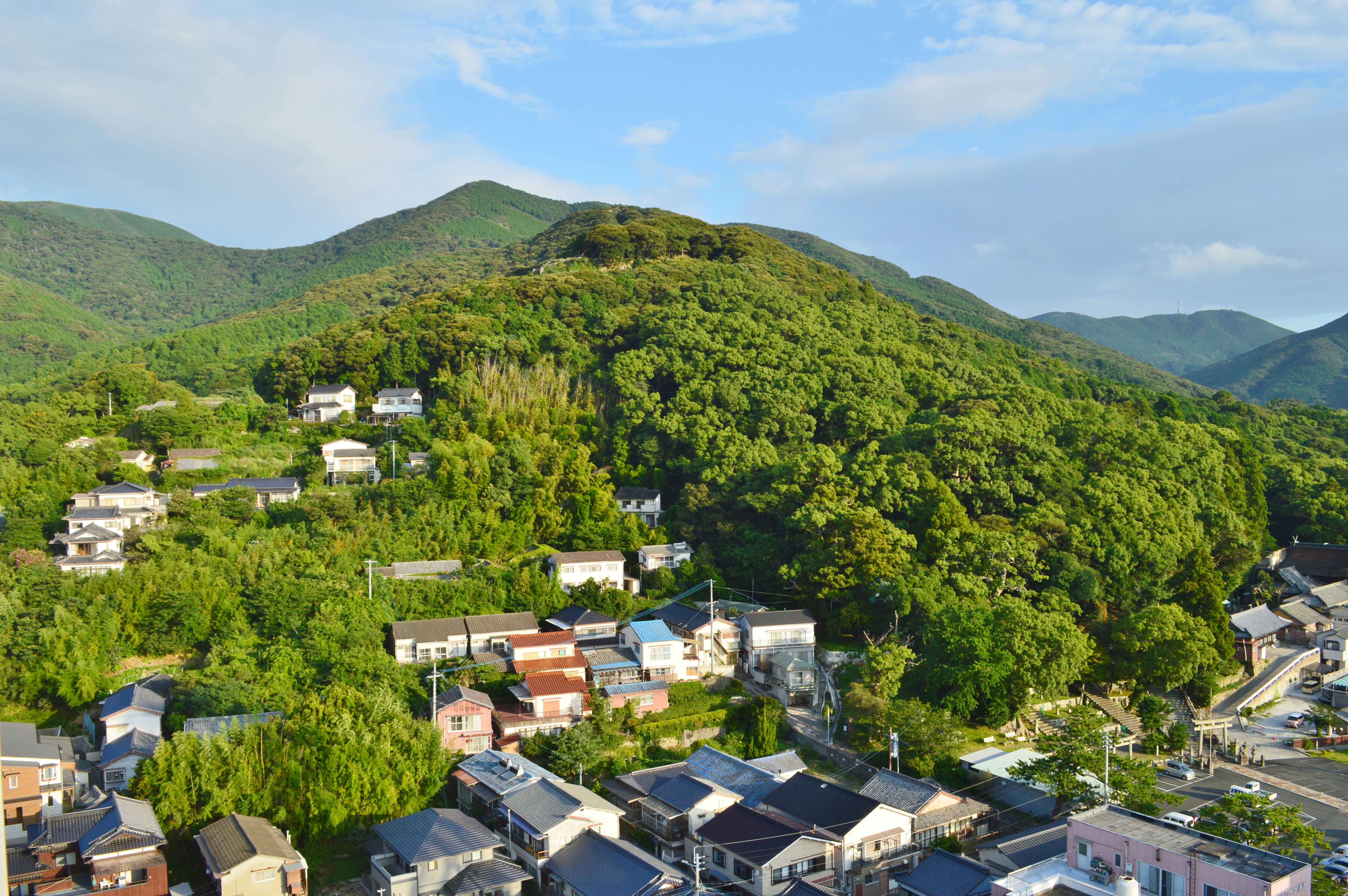 清水山城 (対馬国) 全景